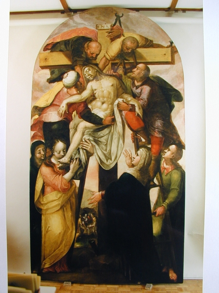 Altarblatt